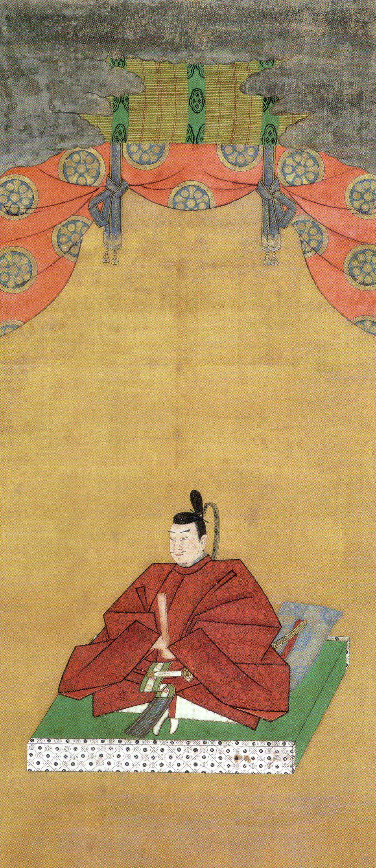 相良長頼像 （江戸時代/17-18世紀作）